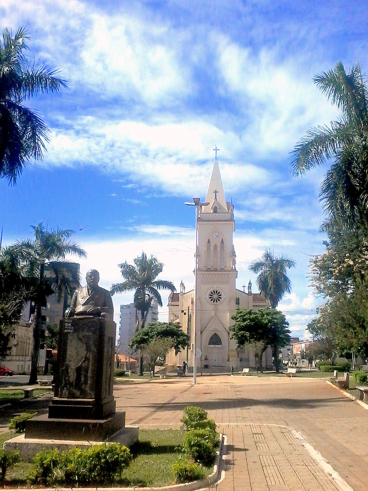 Busto de Olegário Maciel, ex-governador de Minas Gerais e, ao fundo a Catedral de Santo Antônio, em Patos de Minas